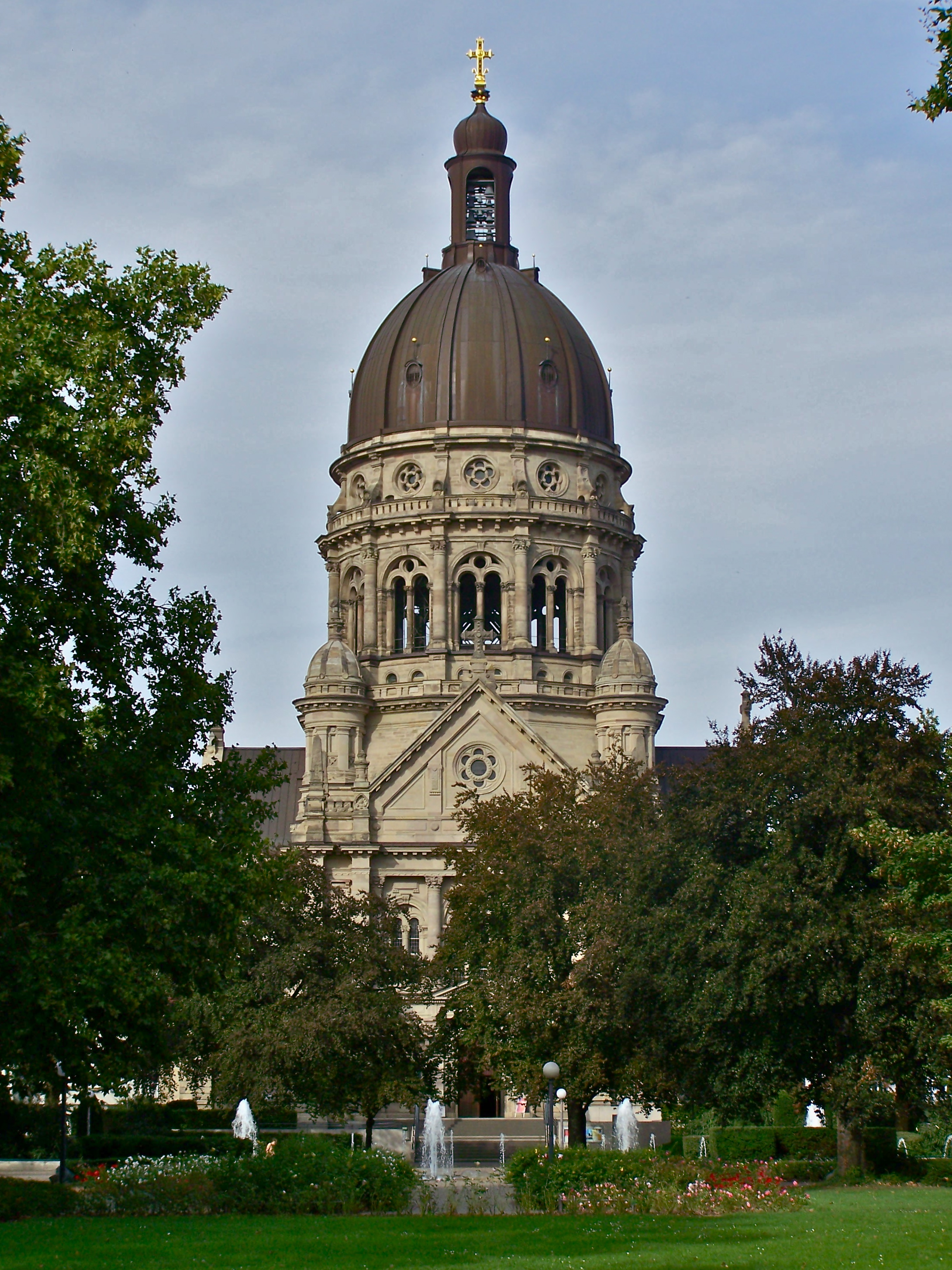 Die Christuskirche (Kaiserstr. 56) und Teil der Kreyßiganlage.